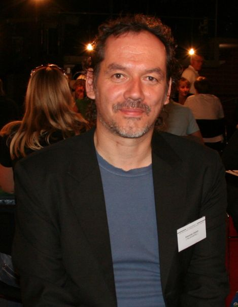 Regisseur Alexander Adolph beim Schwarzmarkt für nützliches Wissen und Nicht-Wissen im Mannheimer Nationaltheater